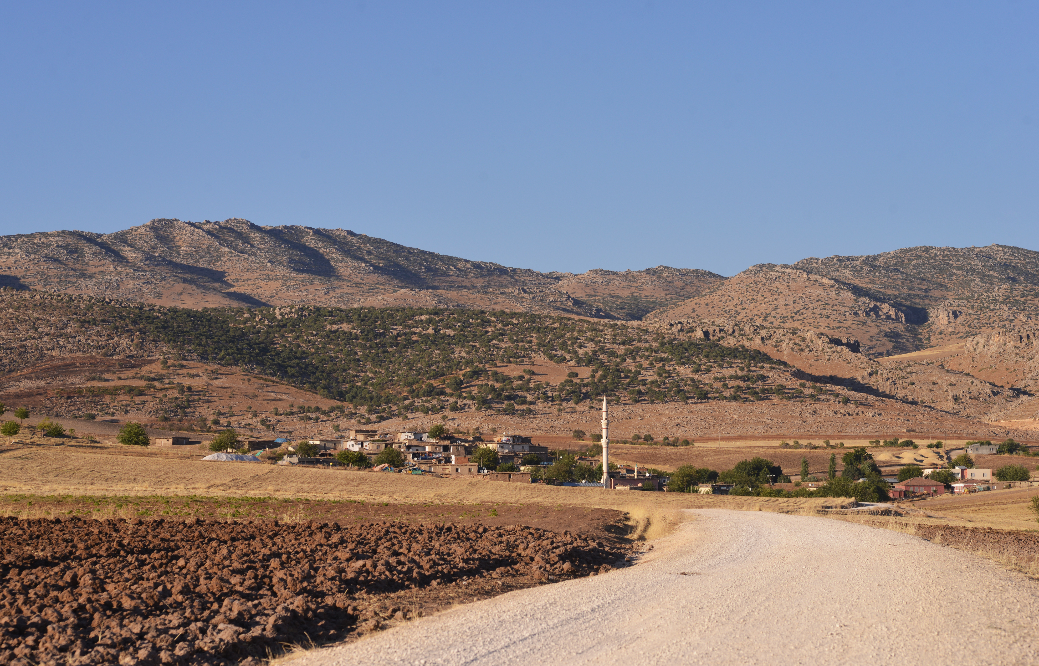 Kurdî: Gundekî Farqînê